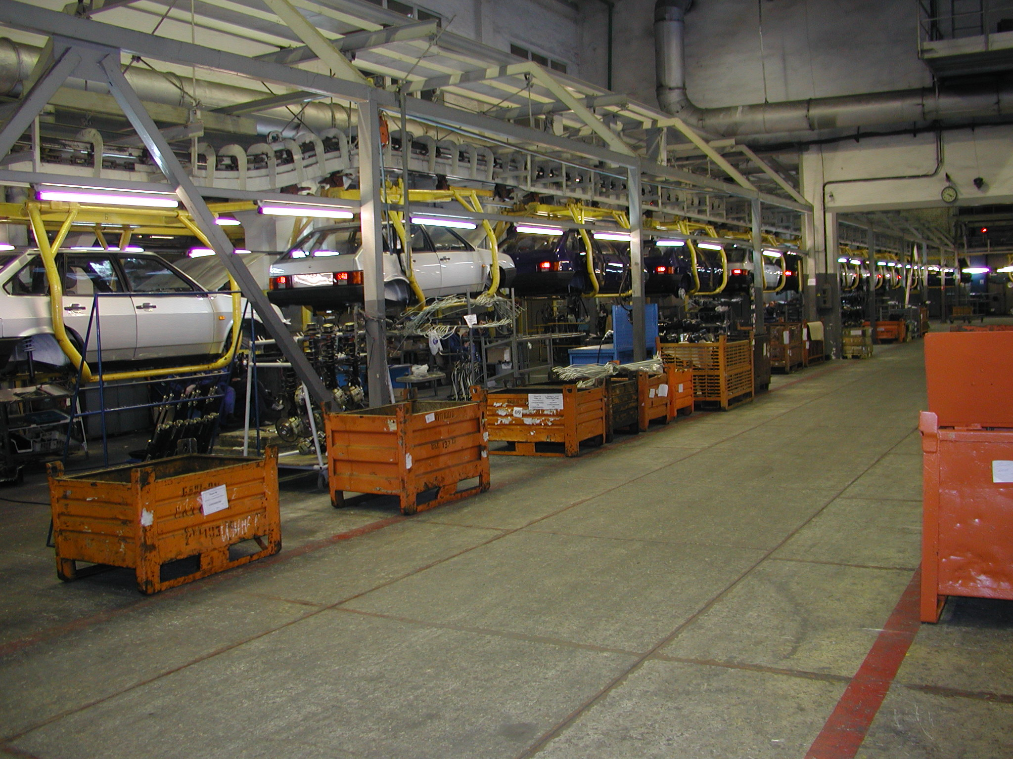 Подвесной конвейер завода "РосЛада". Сборка автомобилей ВАЗ-21093i